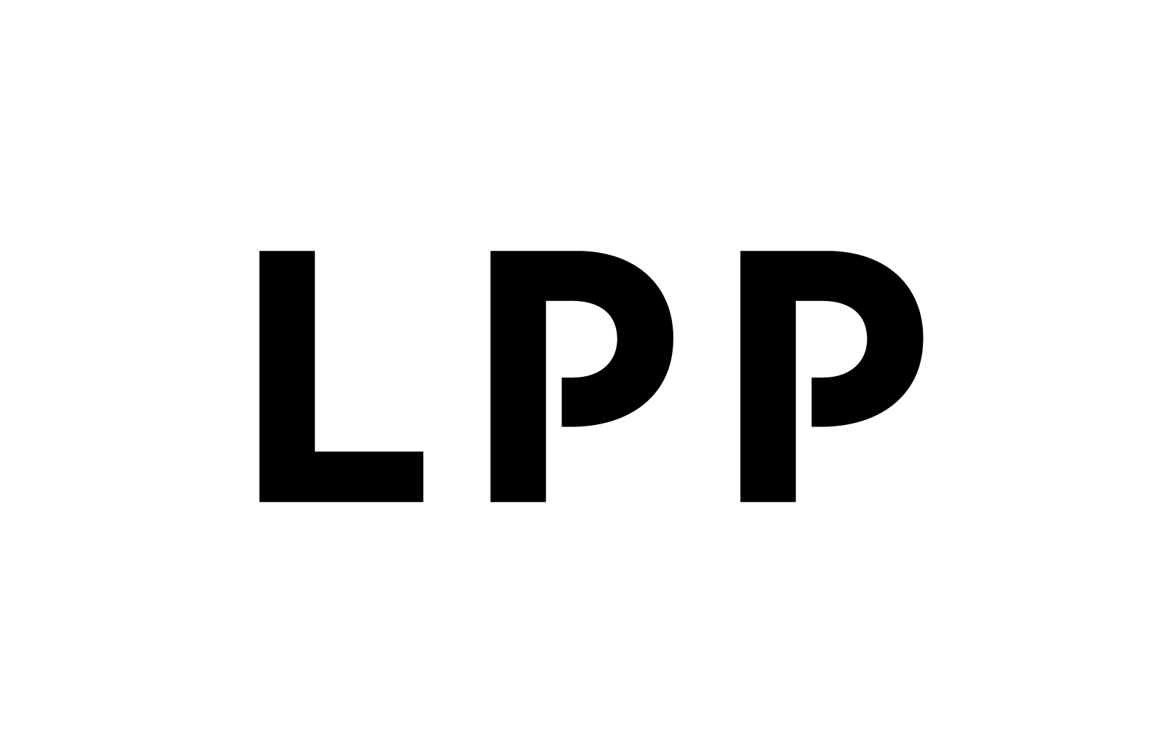 LPP – logo polskiego koncernu odzieżowego z siedzibą w Gdańsku